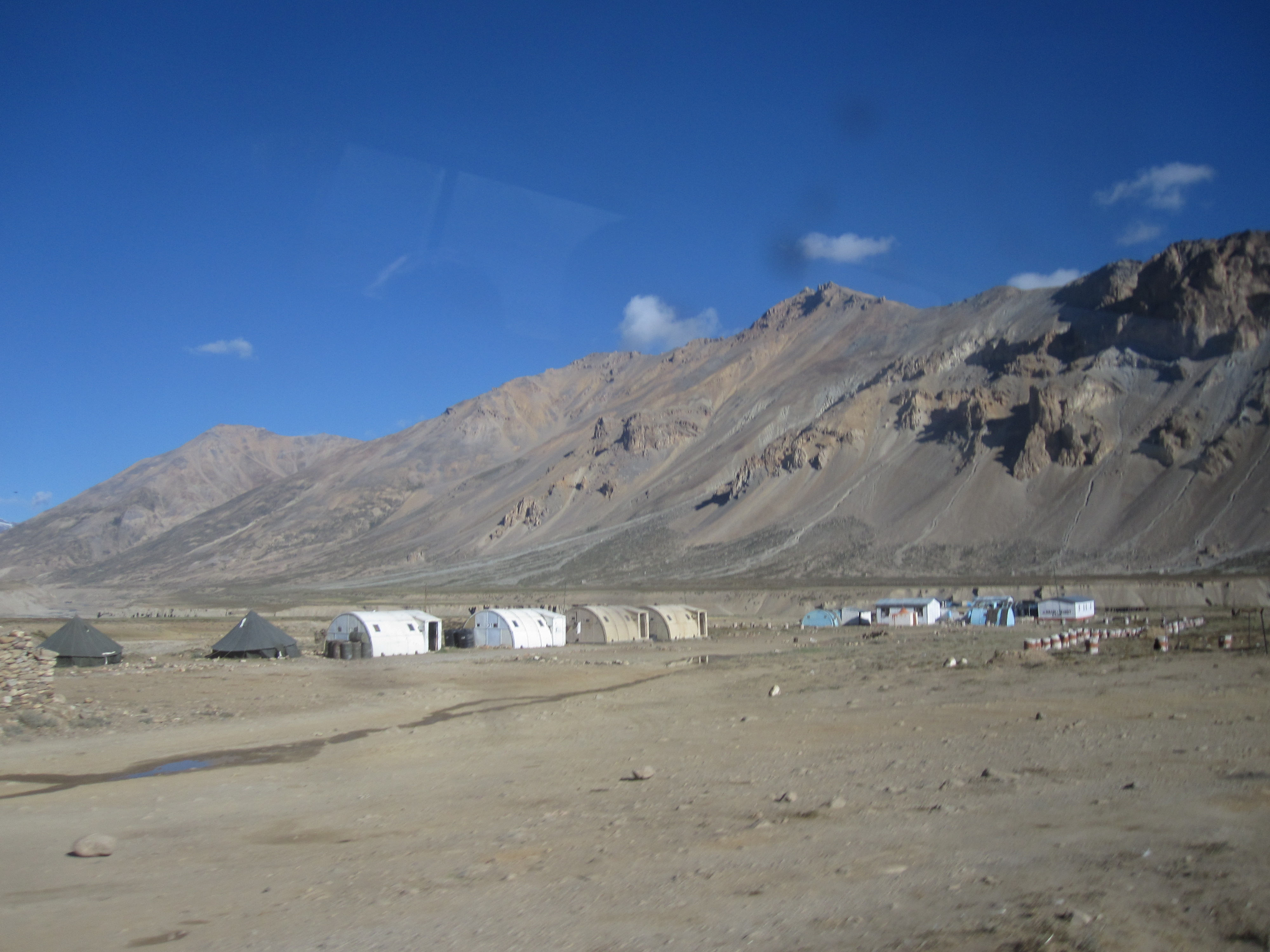 Sarchu, Ladakh, Jammu & Kashmir, India